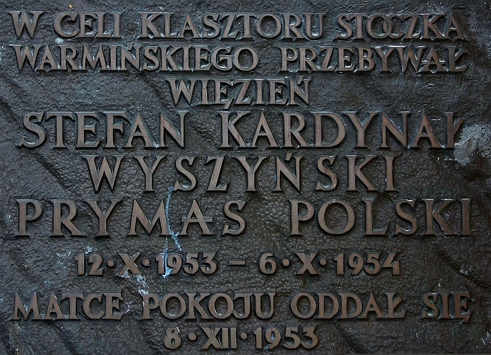 Stoczek Klasztorny – wieś w województwie warmińsko-mazurskim, w powiecie lidzbarskim, w gminie Kiwity